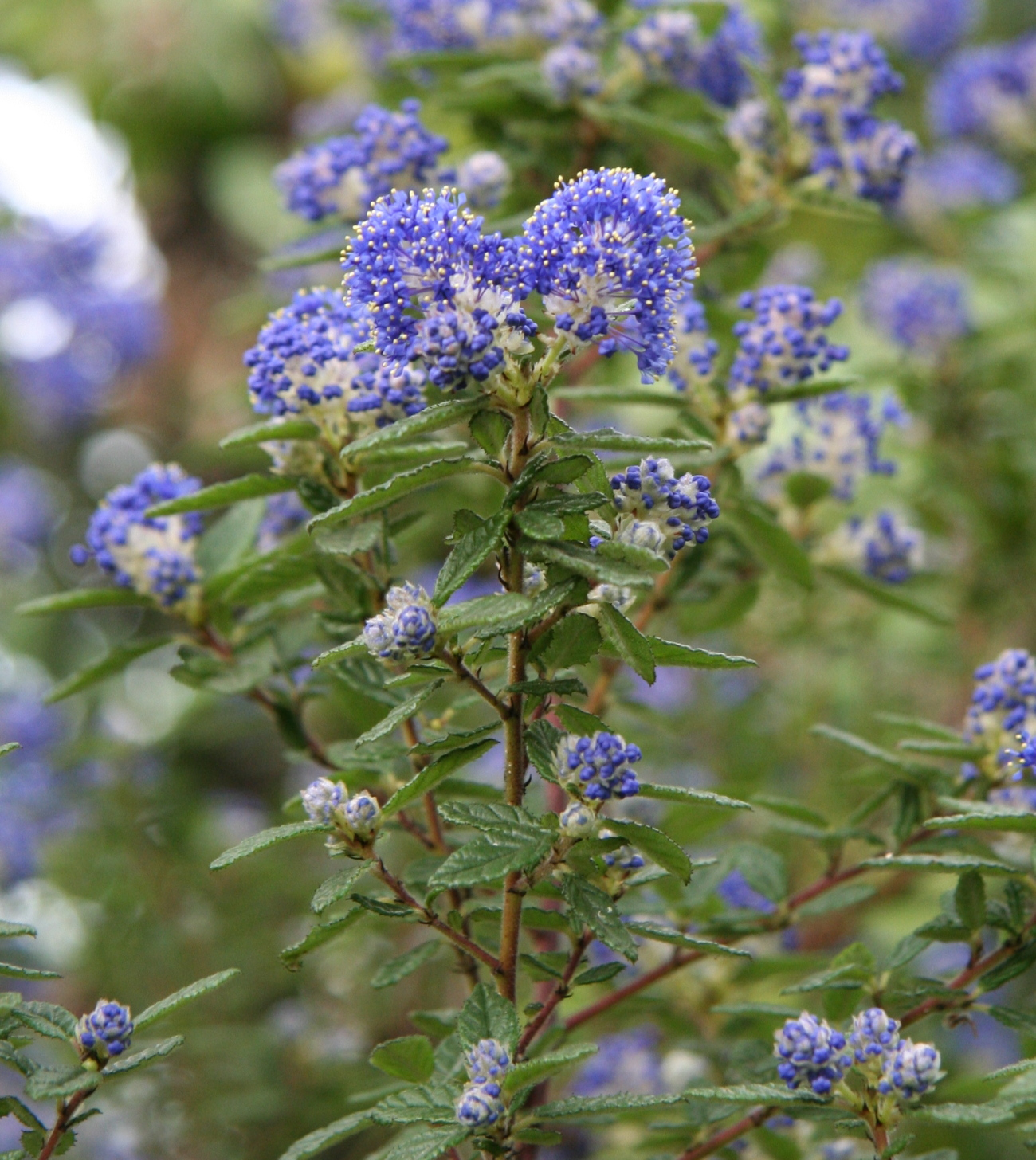 Ceanothus foliosus im Botanischen Garten Dresden